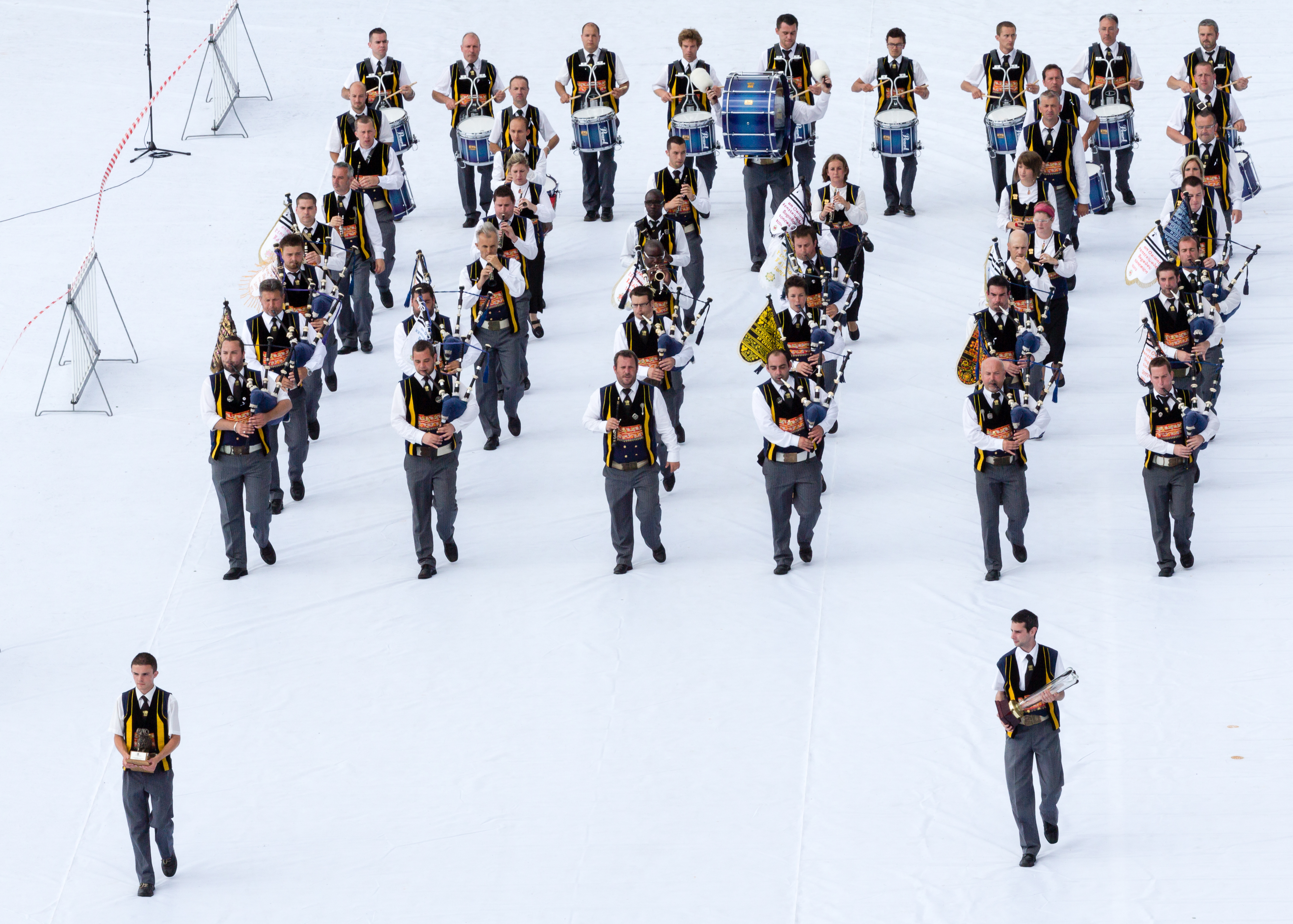 FIL 2012 - Arrivée de la grande parade des nations celtes - Bagad Kemper